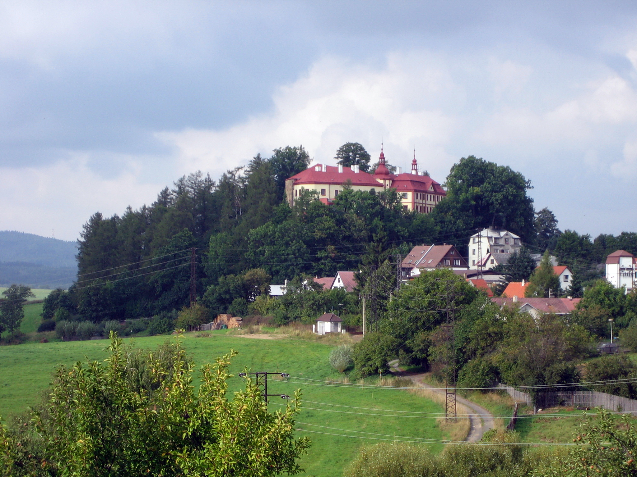 349 53 Bezdružice, Czech Republic